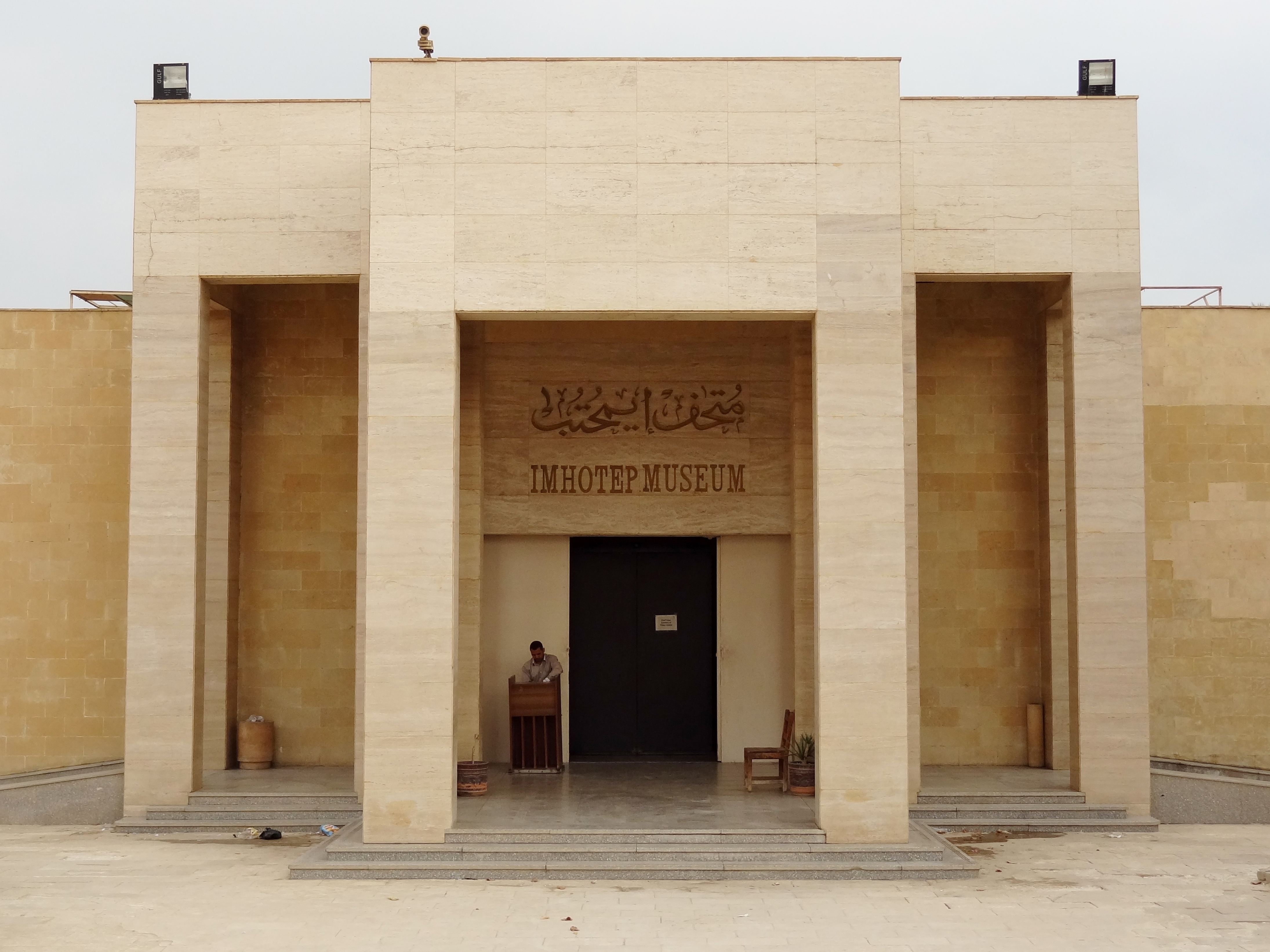 Imhotep-Museum in Sakkara, Ägypten